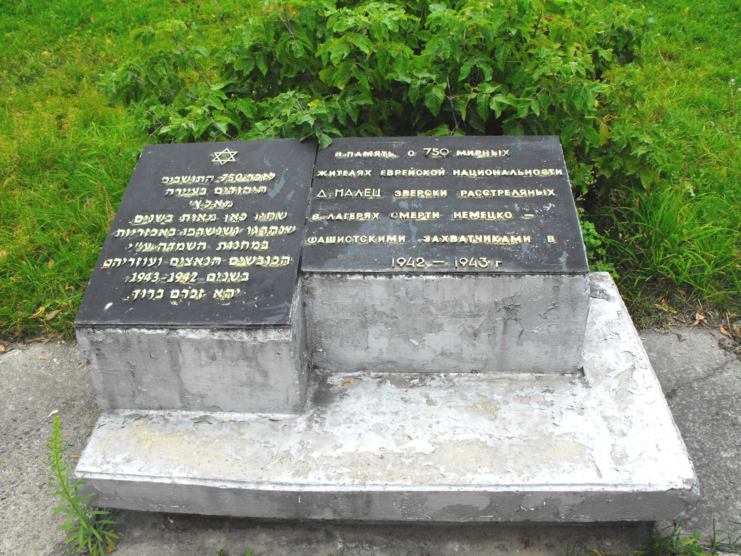 Памятник жителям деревни Малеч (Малец) Березовского района Брестской области (в том числе и евреям), убитым нацистами во время оккупации в 1941-1943 годах.